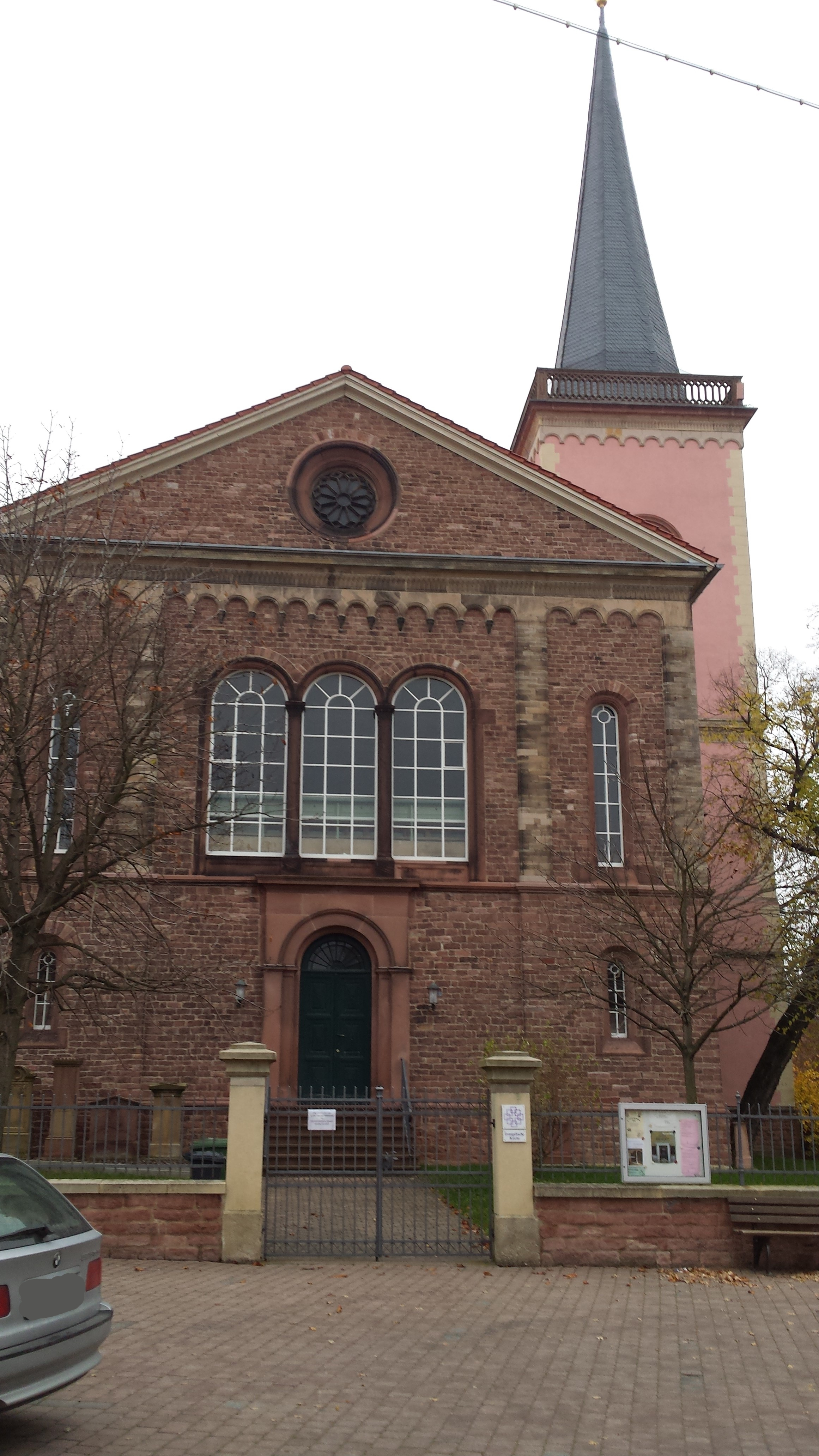 romanisierender Rechtecksaal, 1841–45, Architekt Ignaz Opfermann, spätgotischer Turm, bezeichnet 1486, um 1843 überformt; Sonnenuhr, Gusseisen, 19. Jahrhundert; fünf Pfarrergrabsteine, zweite Hälfte des 19. Jahrhunderts